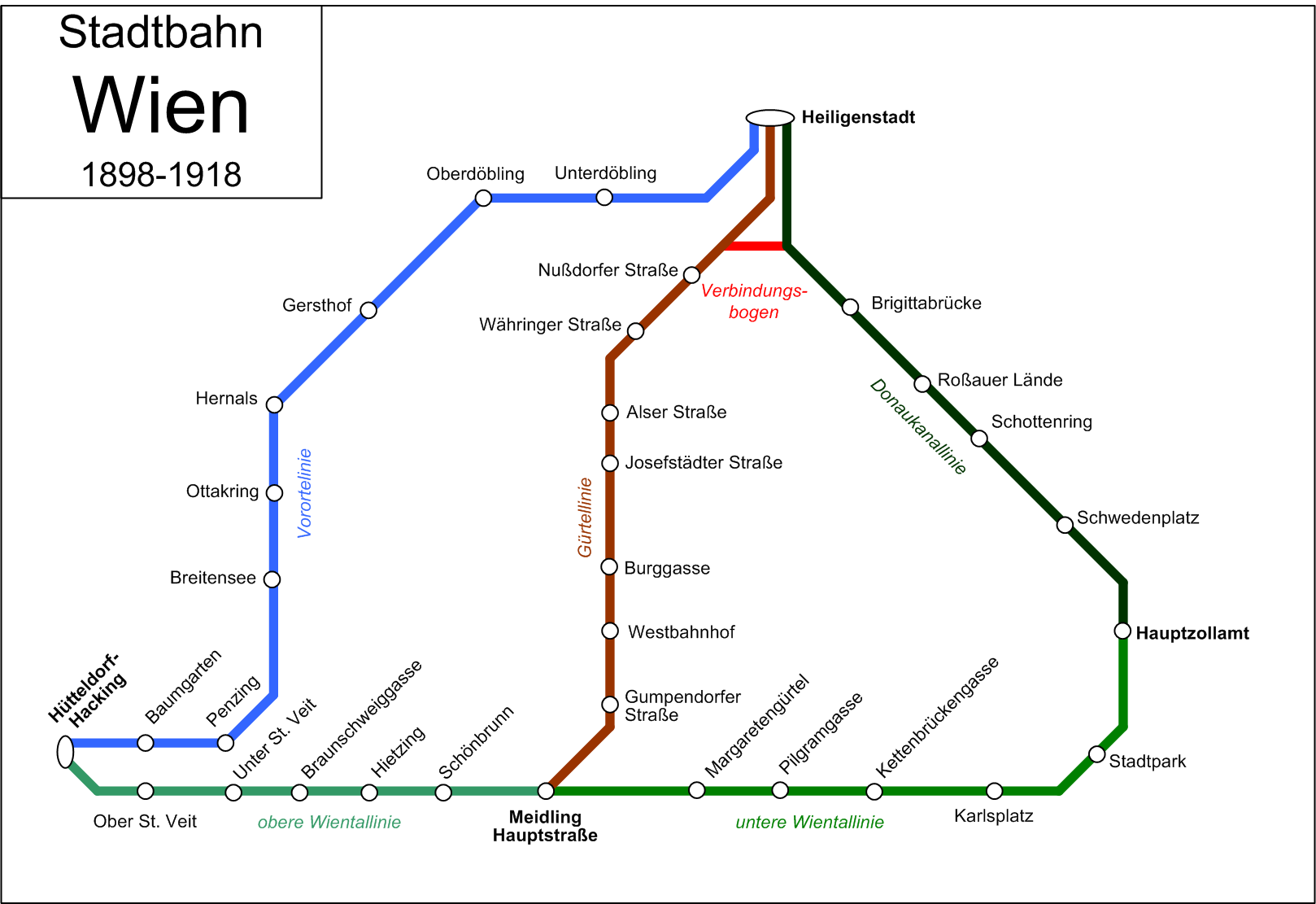 Liniennetz der ehemaligen Wiener Dampfstadtbahn (Die Stadtbahnlinien hatten keine Kennfarbe. Die Farbgebung ist an die heutige Wiener S- bzw. U-Bahn angelehnt.)